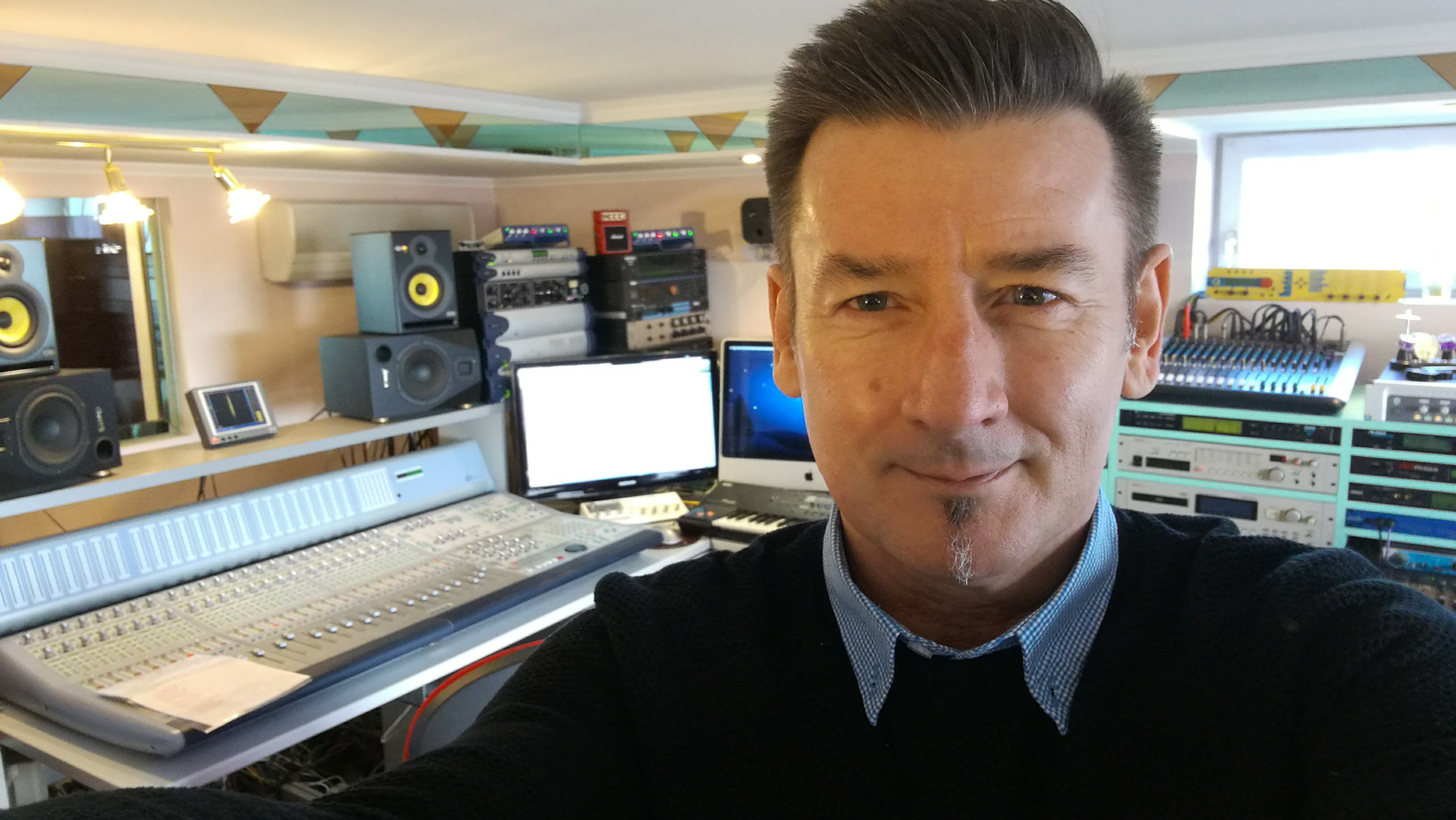 Tonstudio Christian Maier